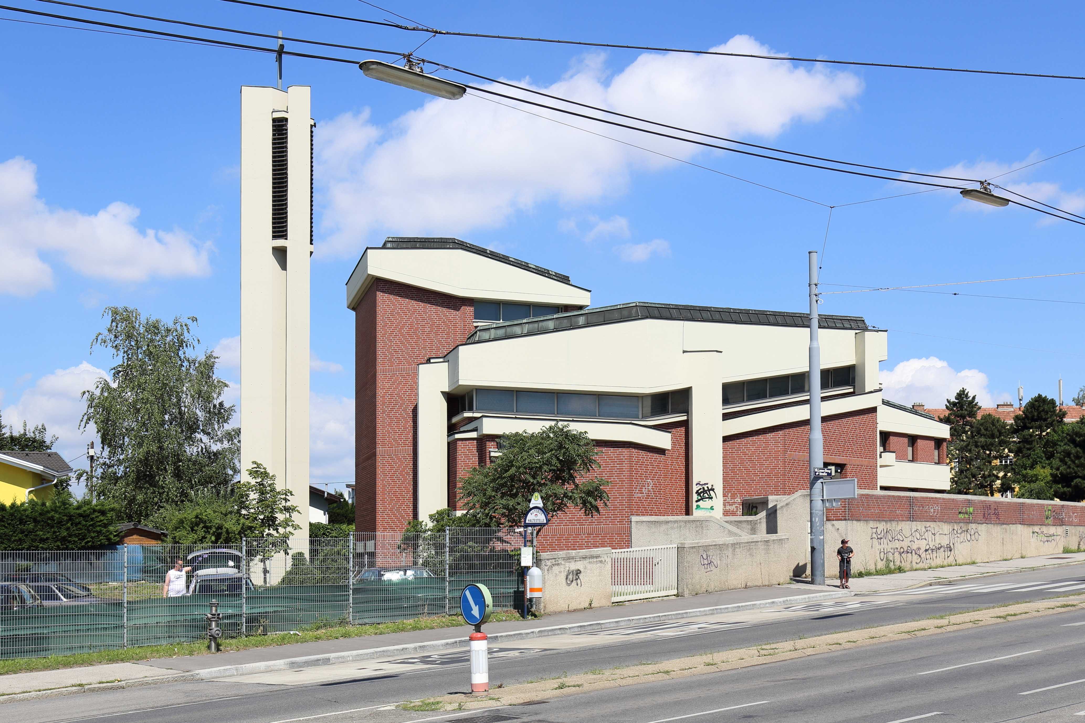 Südostansicht der Kirche Zum Heiligen Kreuz am Laaer Berg an der Adresse Laaer-Berg-Straße 222 im 10. Wiener Gemeindebezirk Favoriten. Die Kirche mit einem ungleichschenkeligen sechseckigen Grundriss und freistehendem Kirchturm sowie das nördlich anschließende Pfarrhaus wurde nach Plänen des Architekten Herbert Schmid gegenüber dem Kurpark Oberlaa auf einer Anhöhe errichtet und 1986 geweiht.Das moderne Gesamtkunstwerk wurde in Anspielung auf die früher dominante Ziegelerzeugung in dieser Gegend in Sichtziegelbauweise ausgeführt.